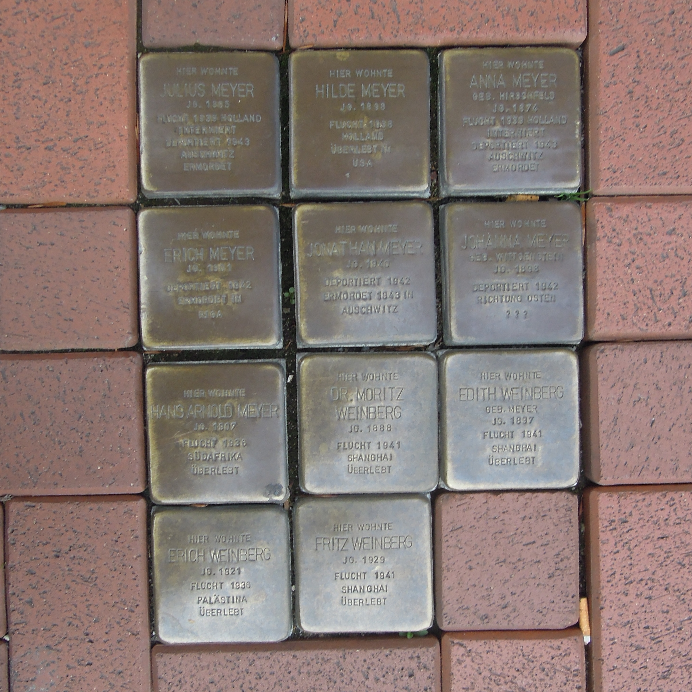 Stolpersteine Am Markt 5 in Castrop-Rauxel